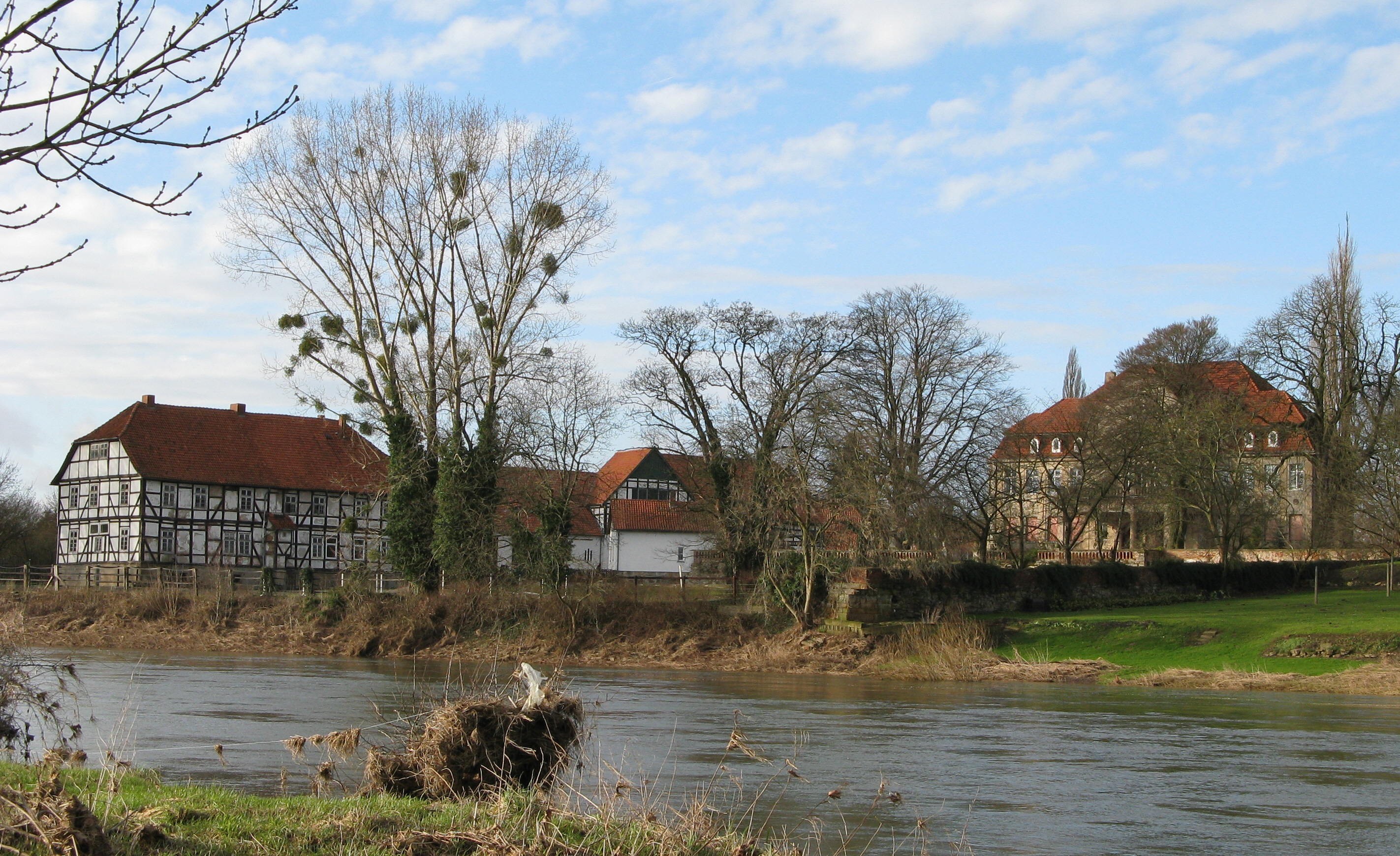 Rittergut Eisbergen von der linken Weserseite aus